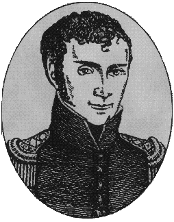 Johann Wilhelm Ritter, deutscher Physiker der Romantik um 1800. Anonymer Künstler. Zeitgenössische Darstellung. Der Schutzdauer ist abgelaufen, da der Künstler länger als 70 Jahre tot ist.